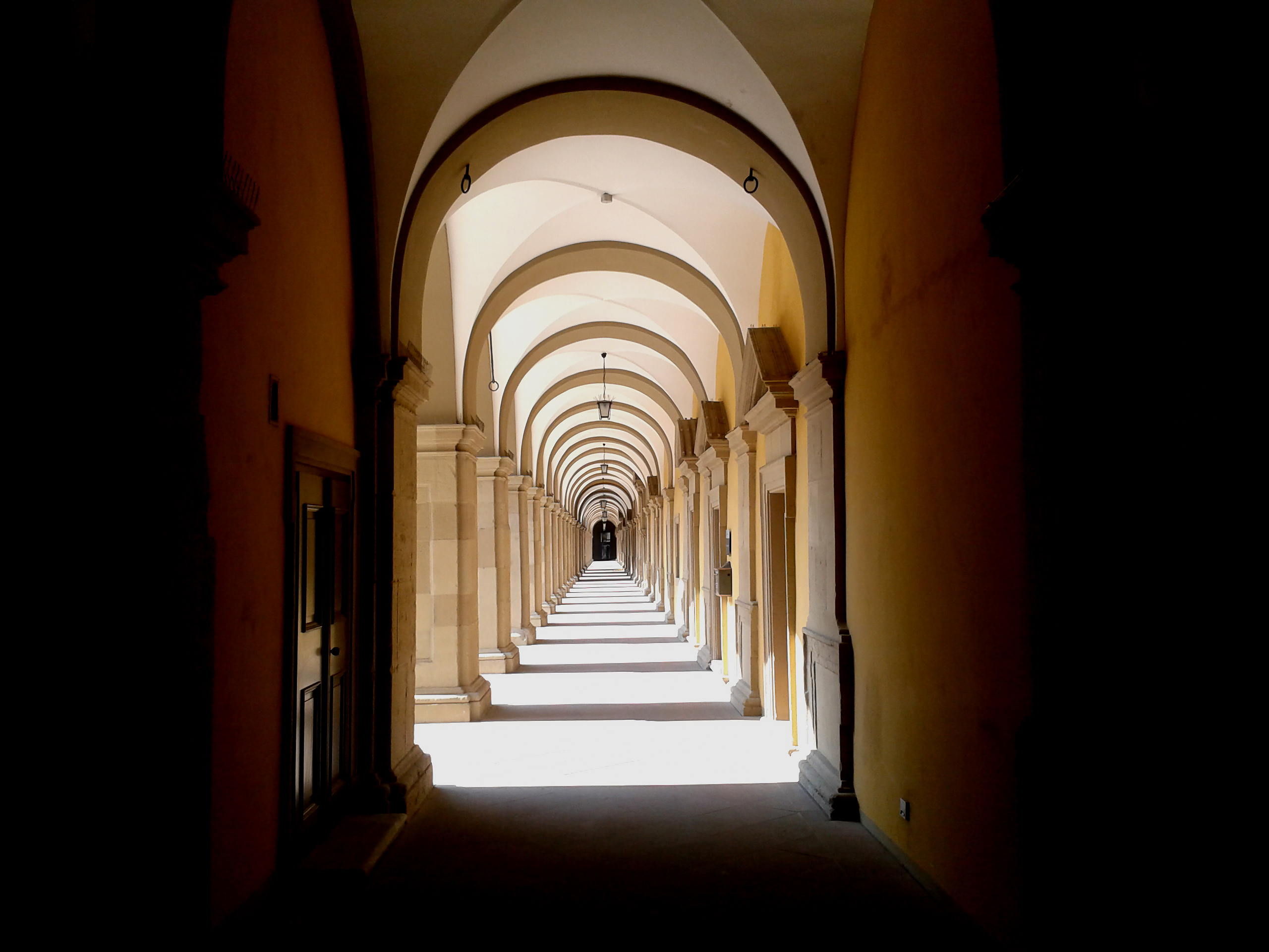 In den Arkaden des Würzburger Julius-Spitals.